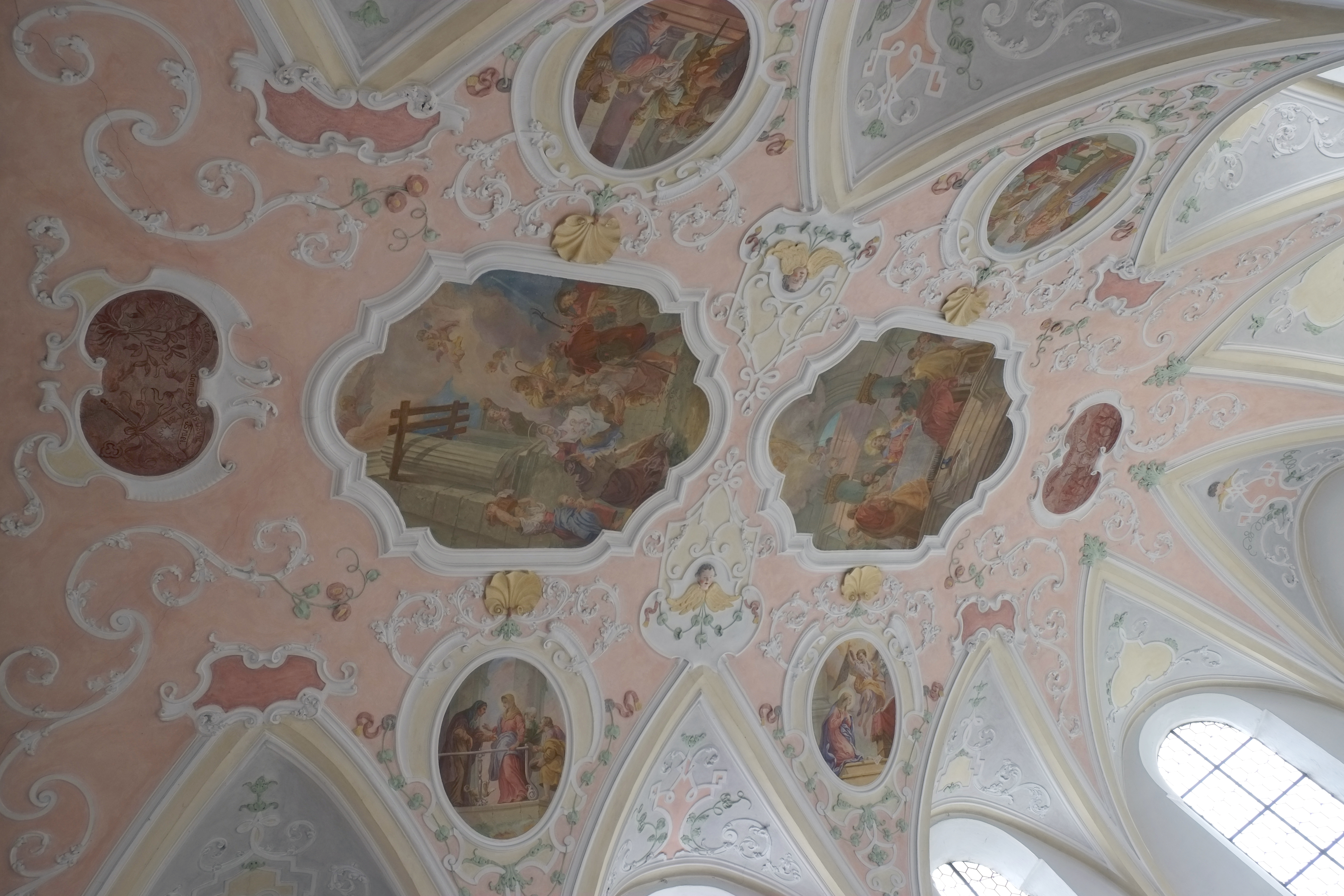 Katholische Pfarrkirche St. Michael in Wörleschwang im Landkreis Augsburg (Bayern, Deutschland)